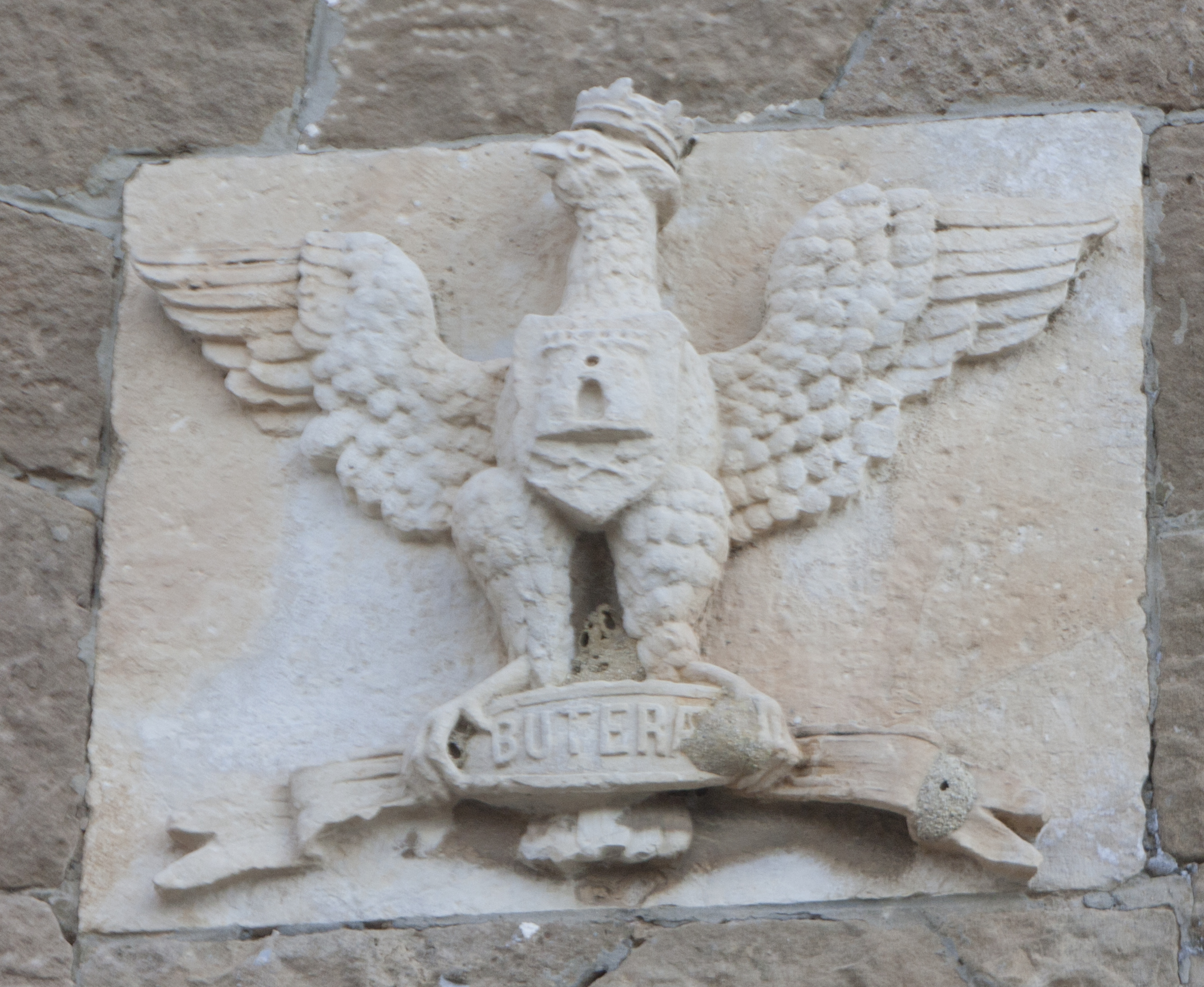 Stemma di Butera in pietra